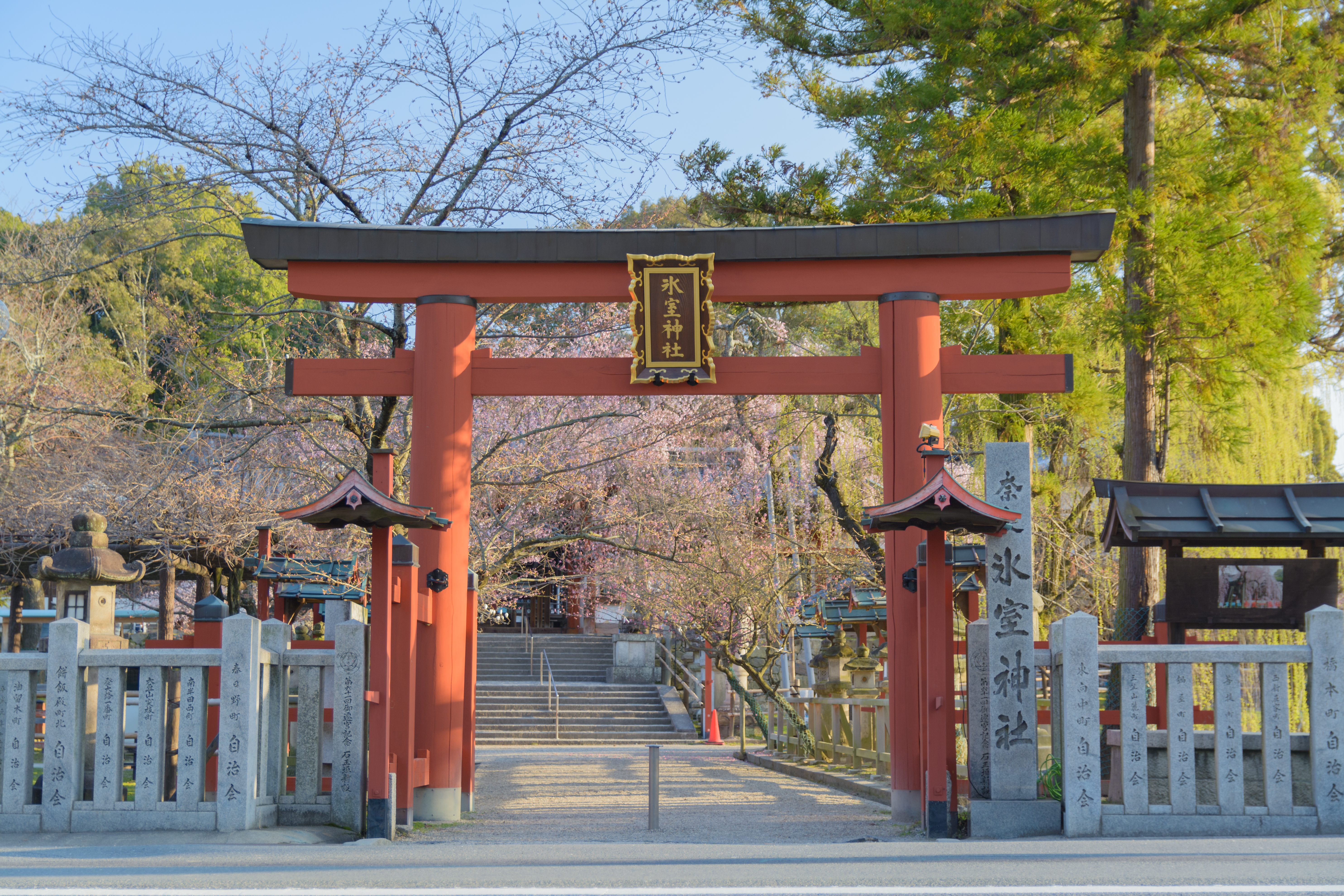 氷室神社（奈良市）